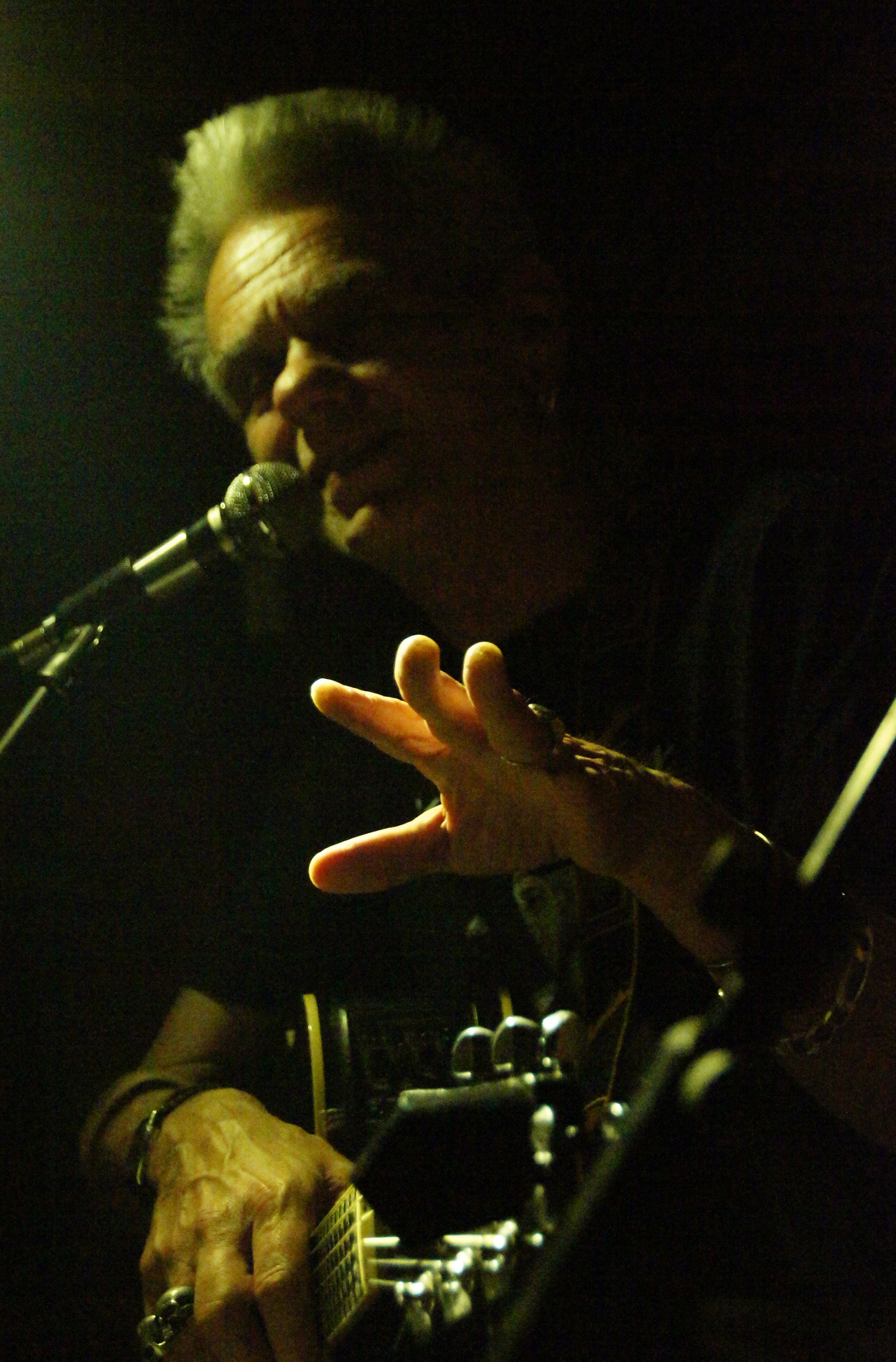 Ulli Bäer, in some Vienniese coffe-bar called "Casablanca".